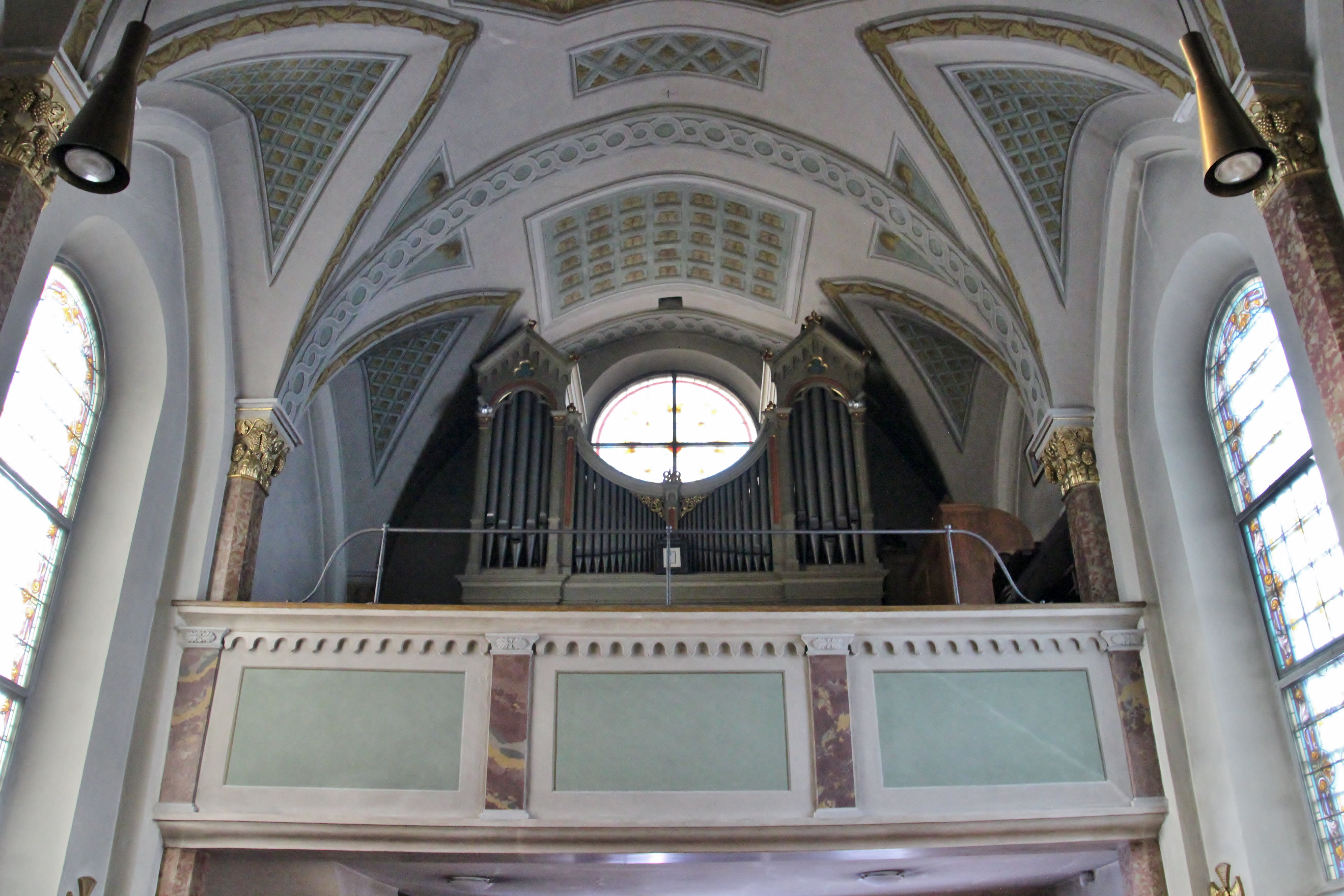 Pfarrkirche St. Katharina in Aufhofen - Chorraum